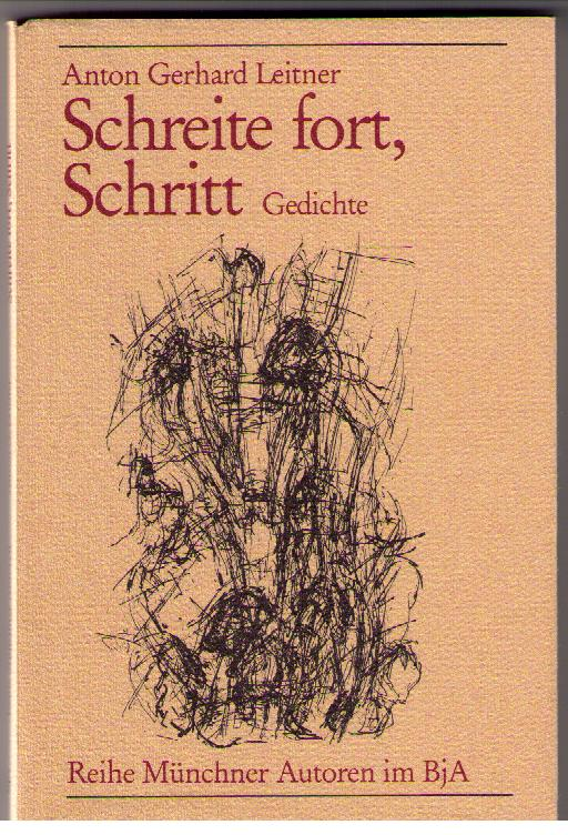 Cover des Lyrikbandes "Schreite fort, Schritt" von Anton G. Leitner illustriert von Michael Gattnarzik